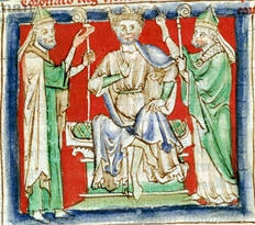 Korunovace Jindřicha II. Anglického